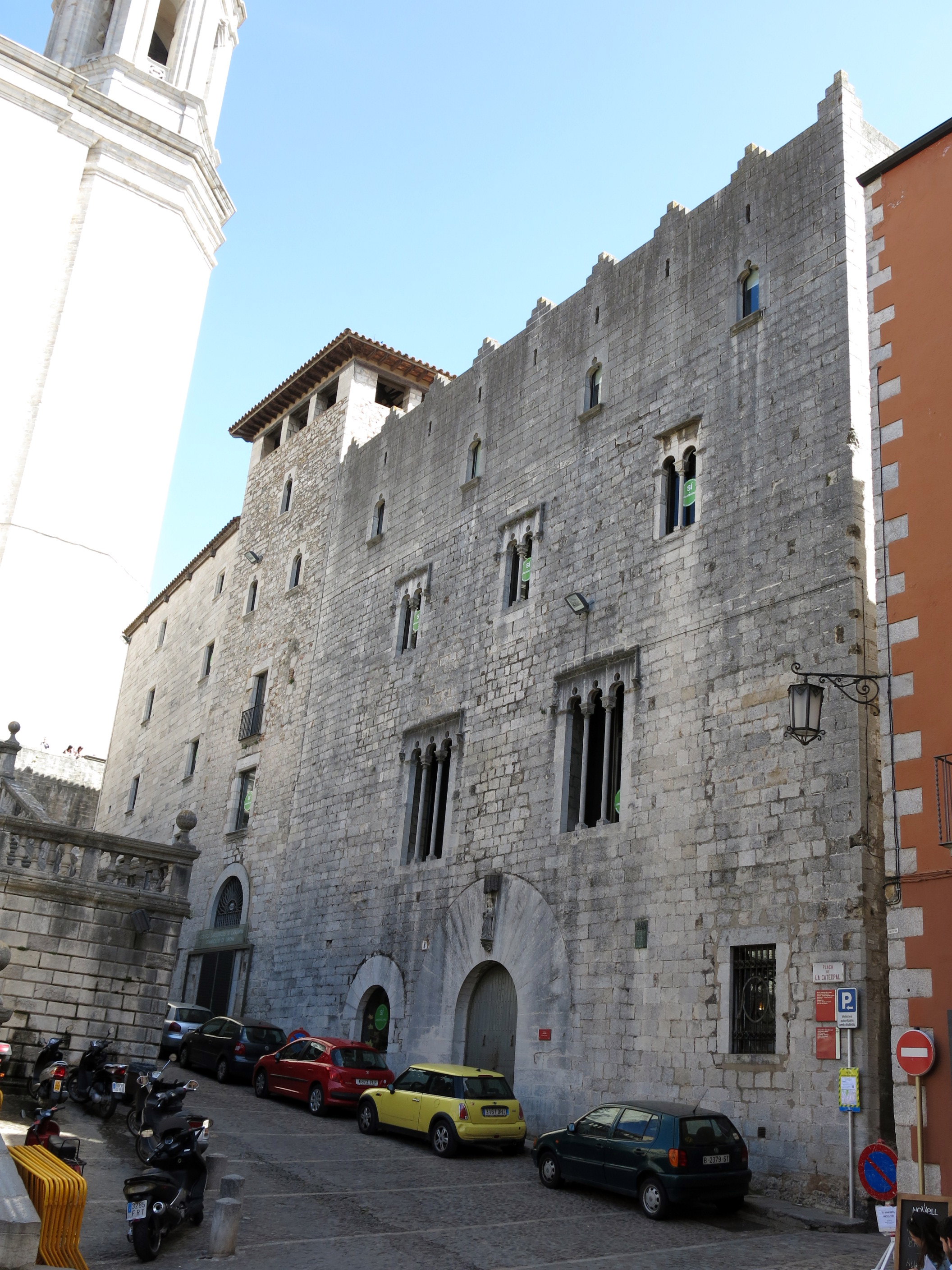 La Pia Almoina (Girona)